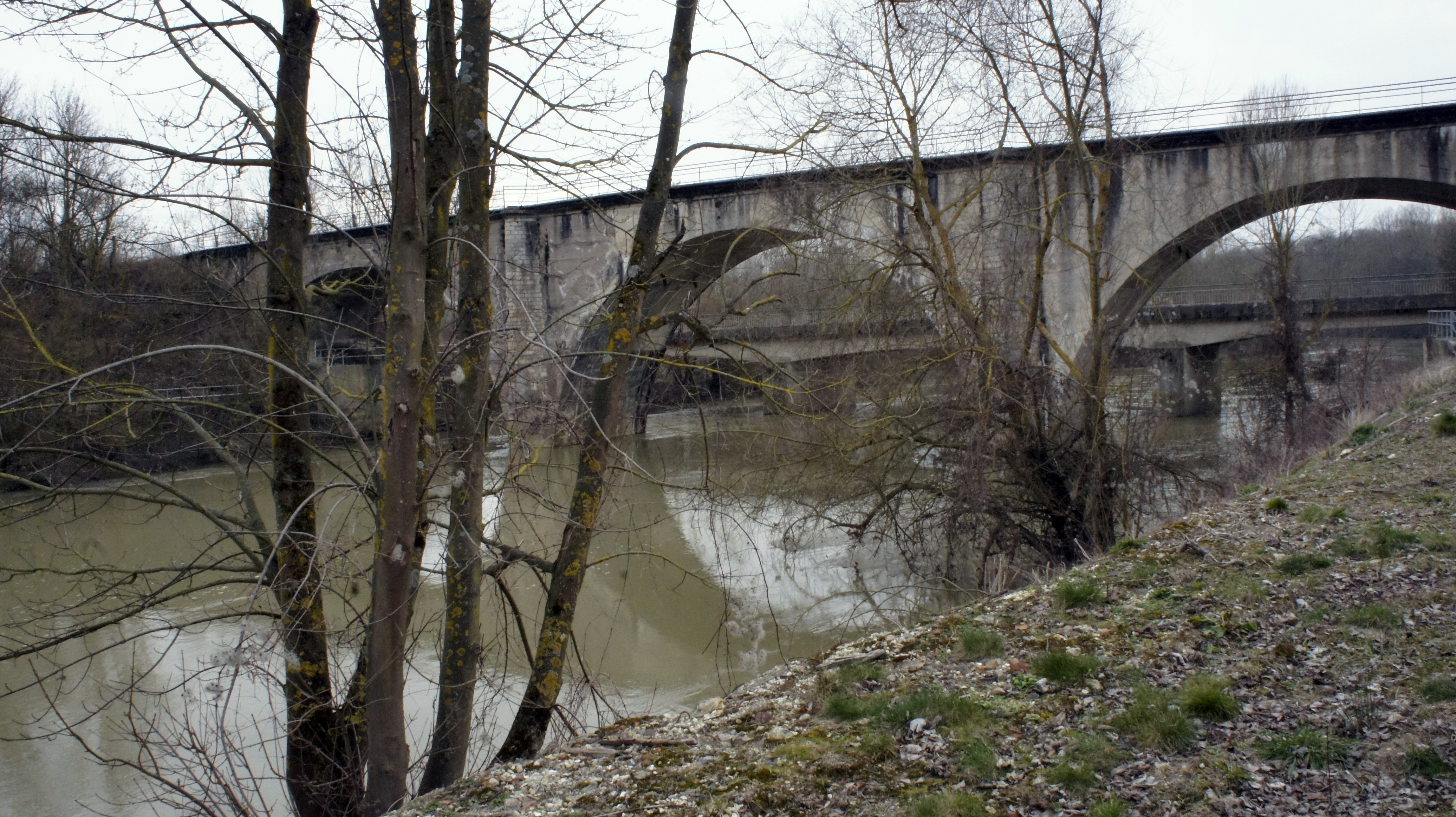 Ponts sur l'Aisne, routier et de la voie ferrée à Guignicourt .